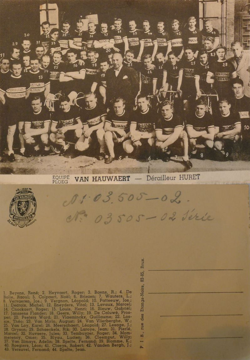 L'équipe cycliste belge VanHauwaert, il s'agit en principe de l'année 1949 ( alors que la marque Dubonnet figure comme sponsor sur les maillots. Lucien Blyau se trouve en n°35